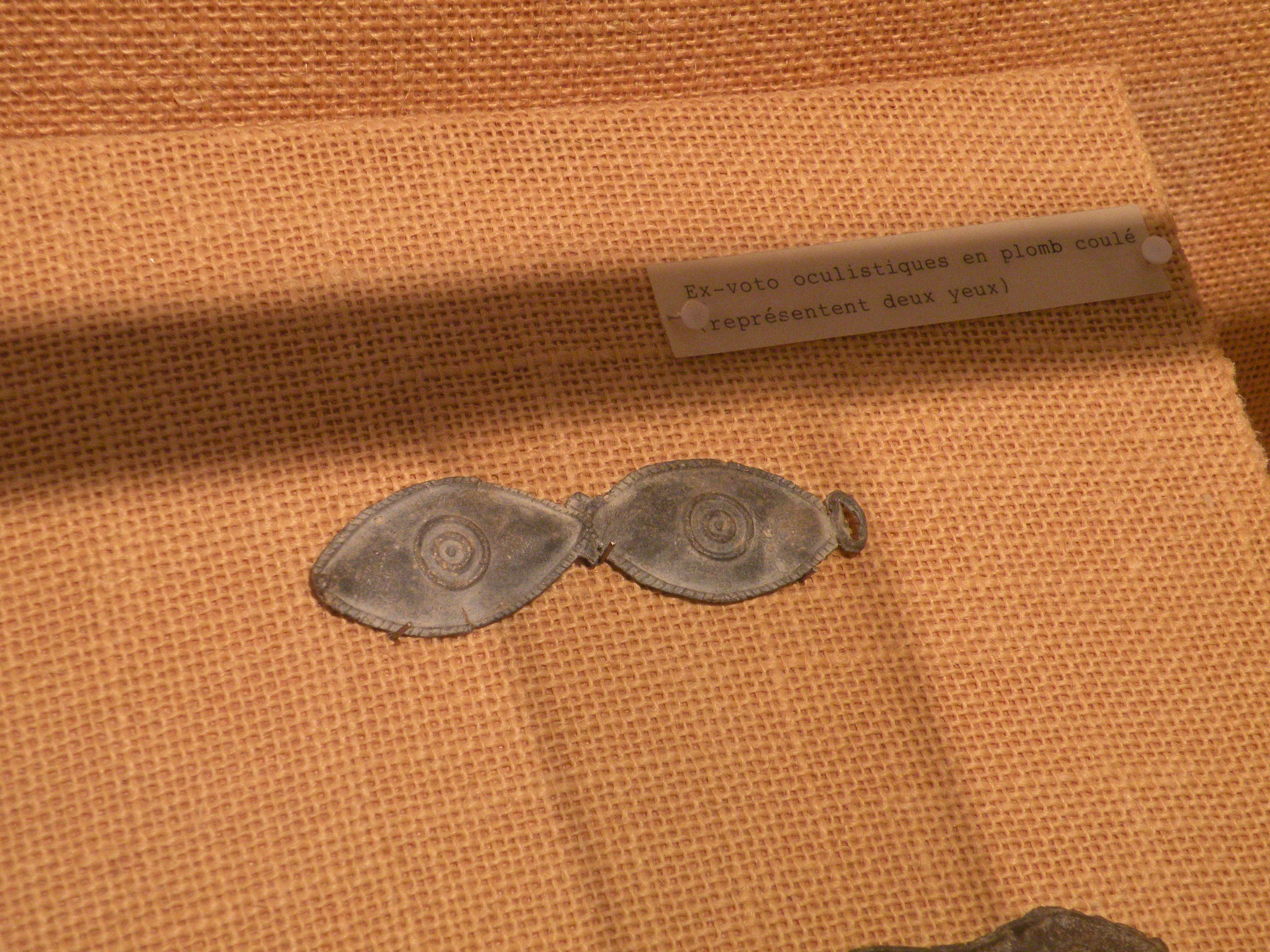 Musée de Thésée (Loir-et-Cher)